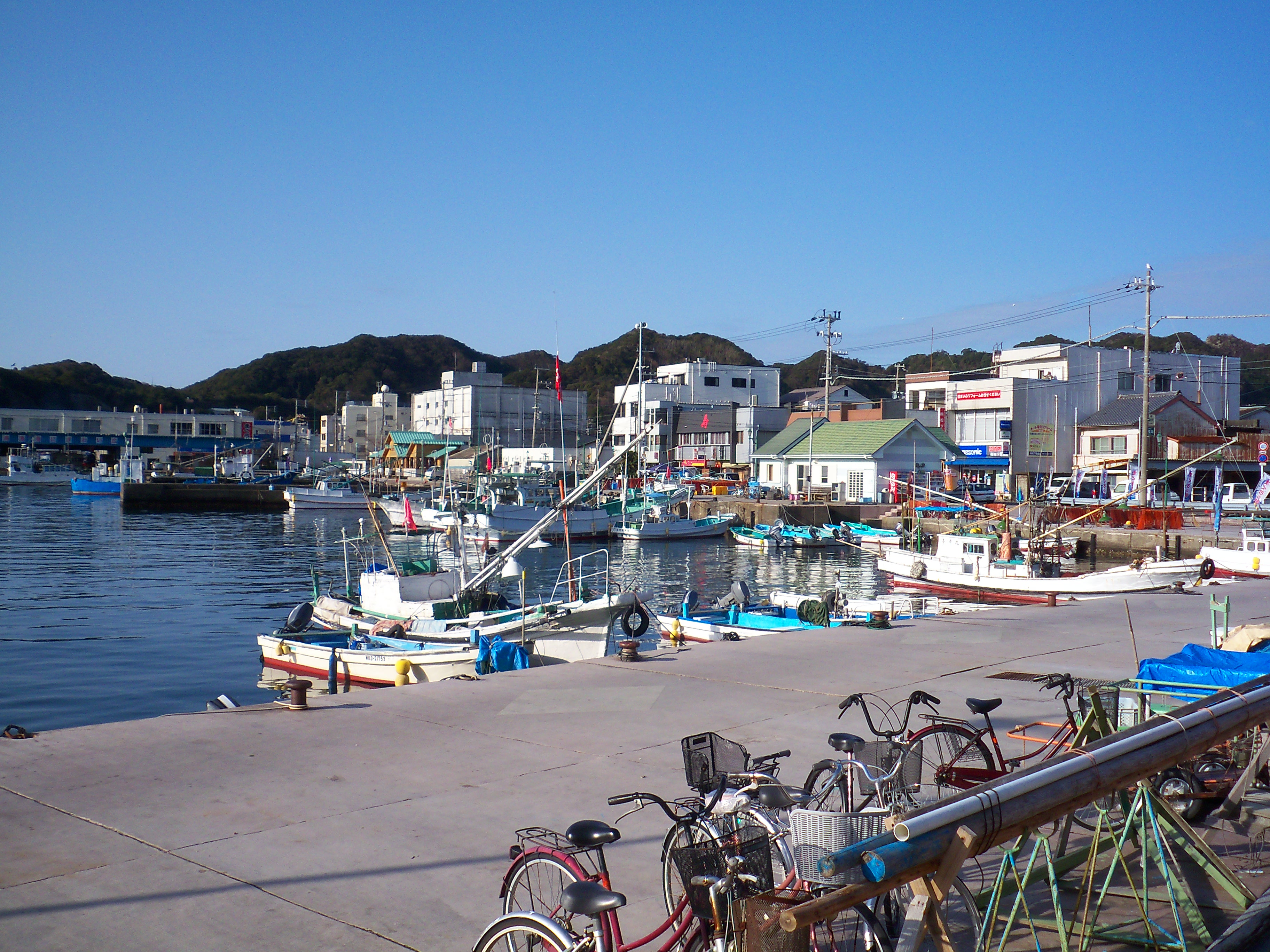 勝浦漁港の朝。